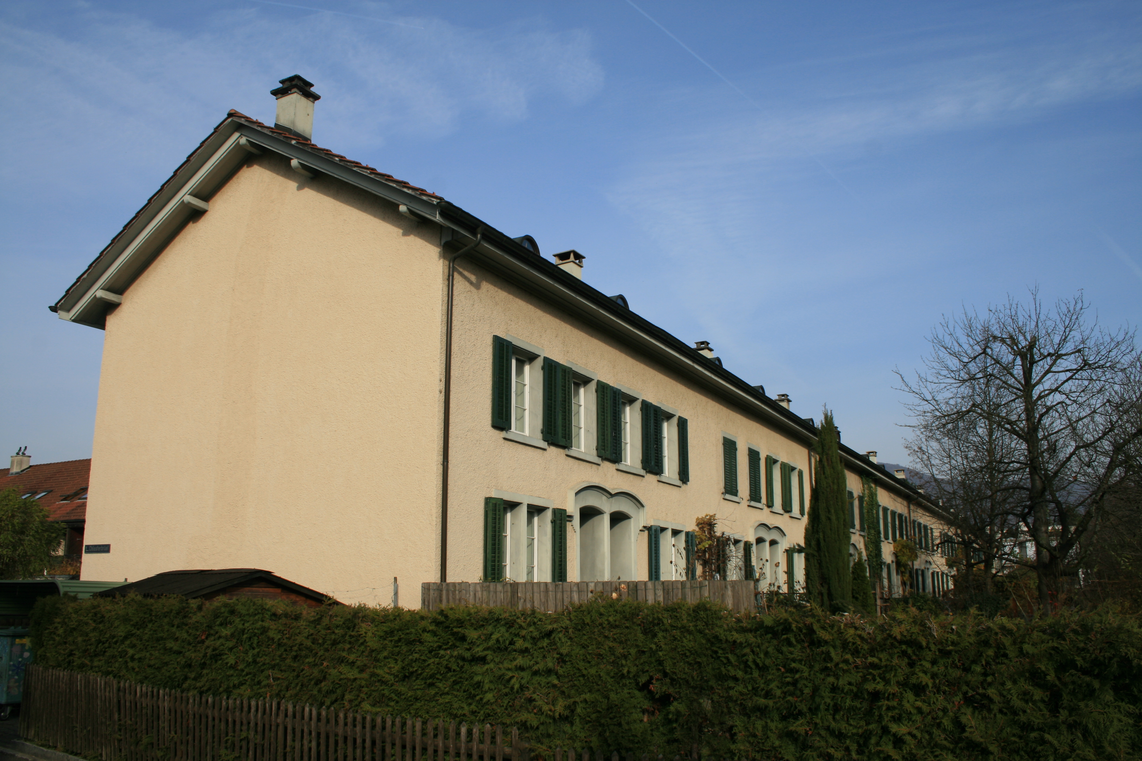 Kosthäuser an der Bahnhofstrasse 13ff, Wettingen